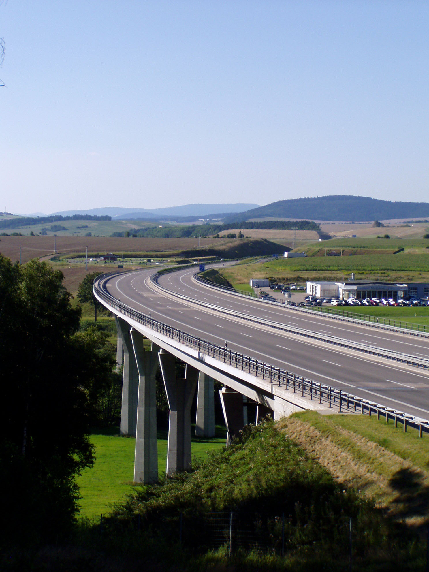 Talbrücke Werratal der A73 bei Eisfeld